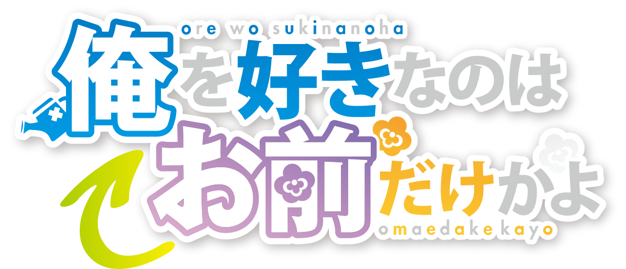 Logo de la serie Ore wo Suki nano wa Omae dake ka yo